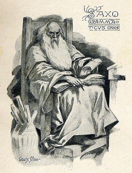 Iconographie de l'historien danois Saxo Grammaticus par le dessinateur et peintre Louis Moe.